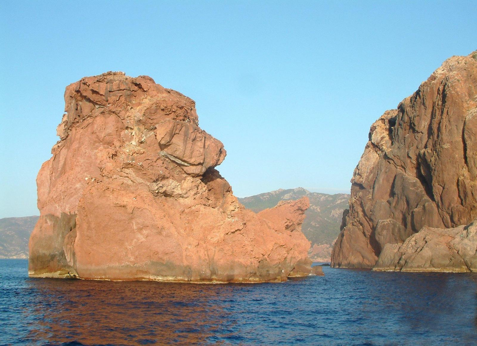 Scandola - Ilot Palazzu